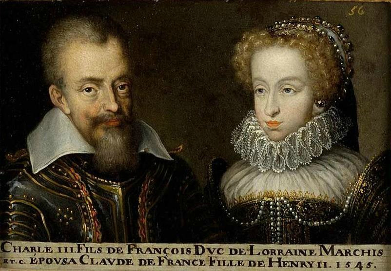 Portrait de Charles III, duc de Lorraine et de Bar, et de son épouse Claude de France. Ce tableau fait partie d'une suite d'une soixantaine de double-portraits représentant les ducs et duchesses de Lorraine ainsi que leurs ancêtres supposés.